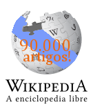 Logo para conmemorar os 90.000 artigos.